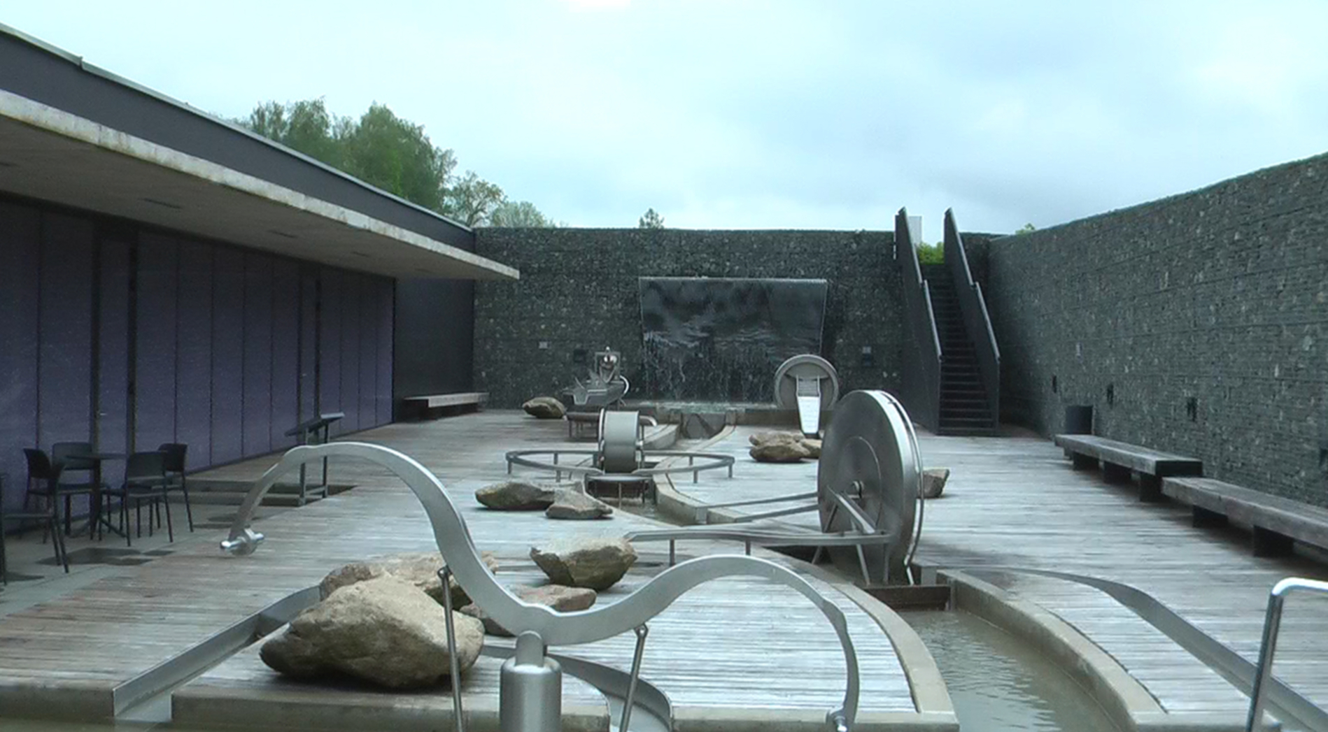 Vodní dům u vodní nádrže Švihov - interaktivní expozice o vodě